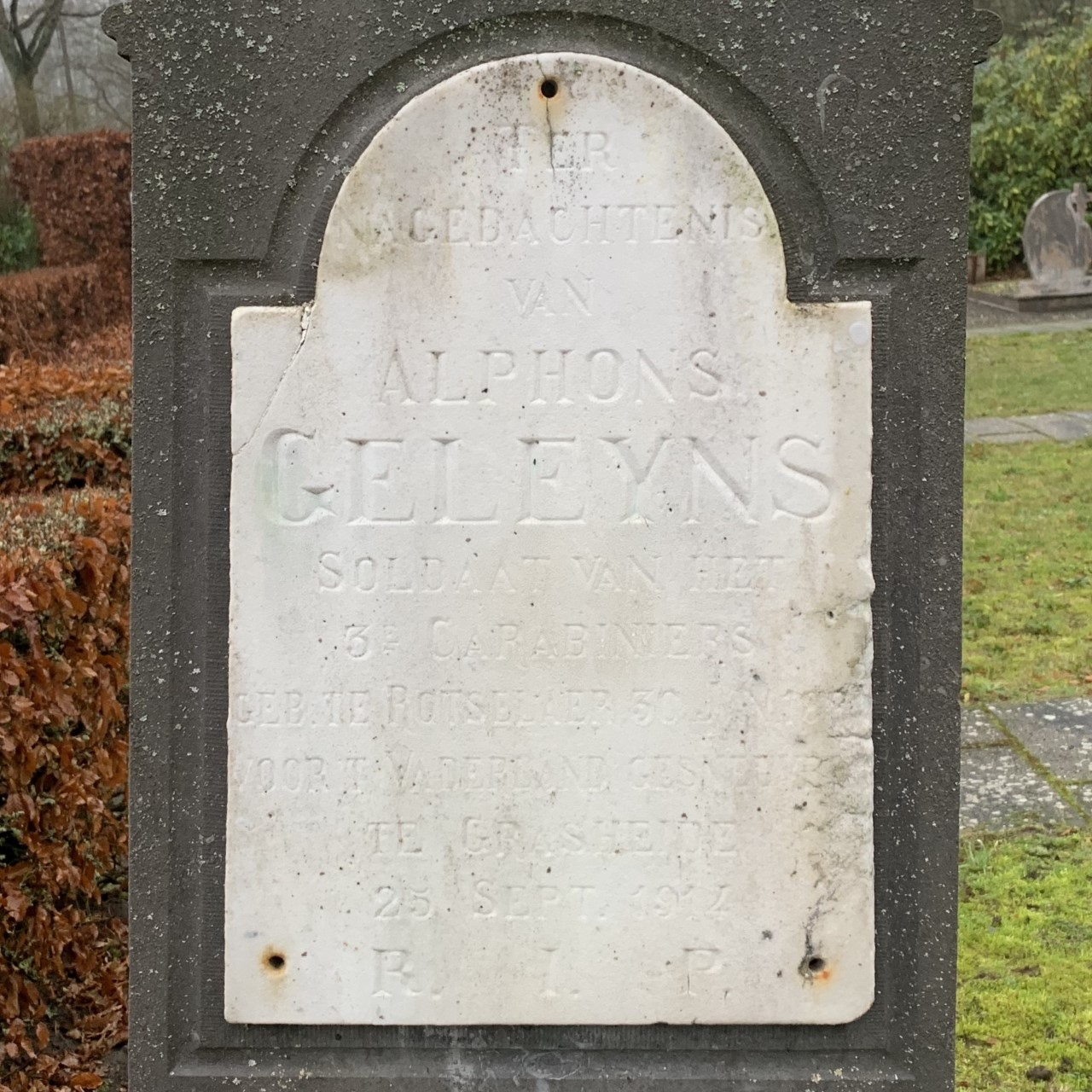 Foto van het grafschrift op de grafzerk van Louis-Alphonse (Alfons) Geleyns, Belgisch soldaat. Genomen te Grasheide op 27 december 2019.